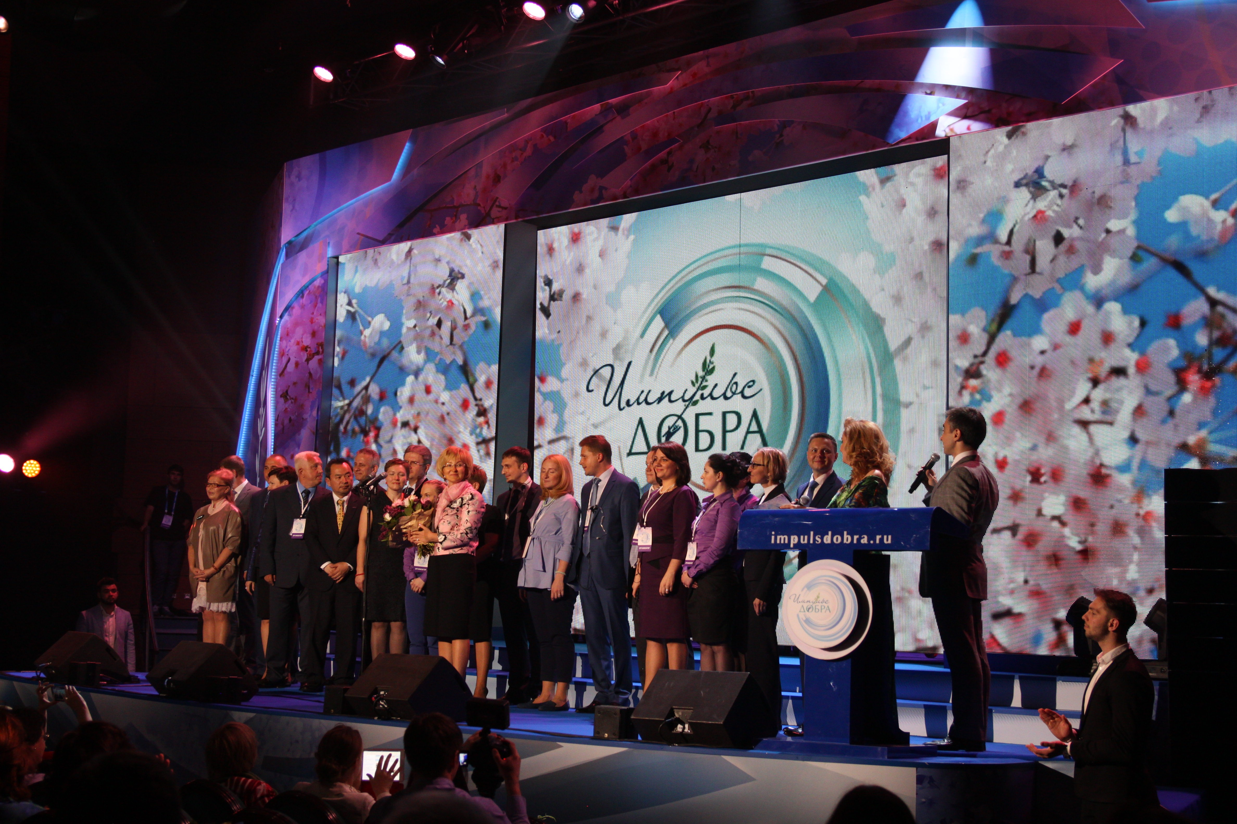 Премия в области социального предпринимательства "Импульс добра-2015"